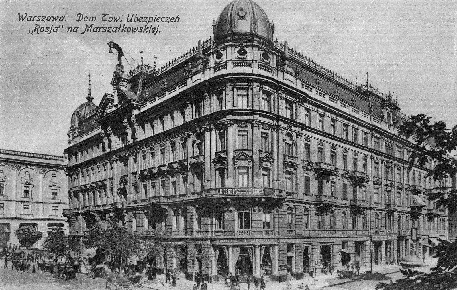 Dom Towarzystwa Ubezpieczeniowego "Rossija" w Warszawie